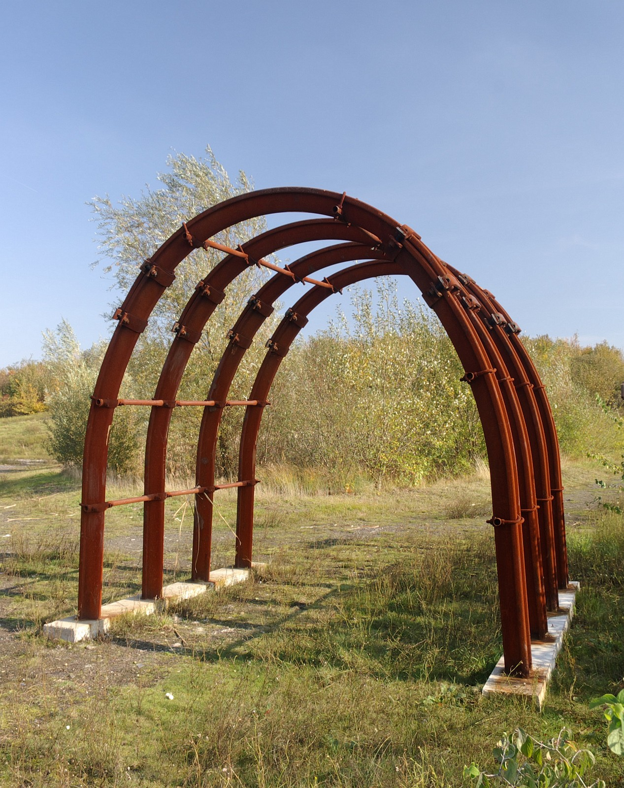 Ausstellung eines Strebausbaus, Bergbaulehrpfad auf der Kissinger Höhe in Hamm, einer Bergehalde im Ruhrgebiet